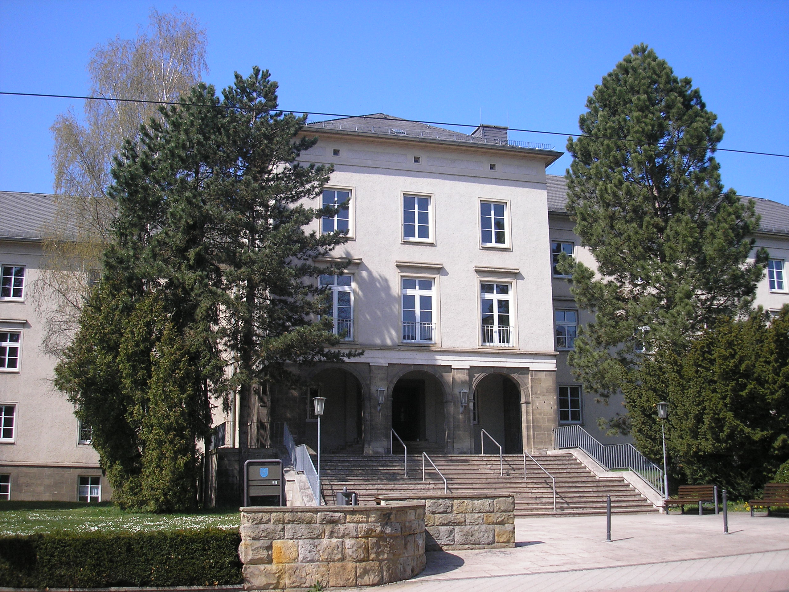 Das Gebäude der ehemaligen Finanzfachschule in Gotha (Thüringen).